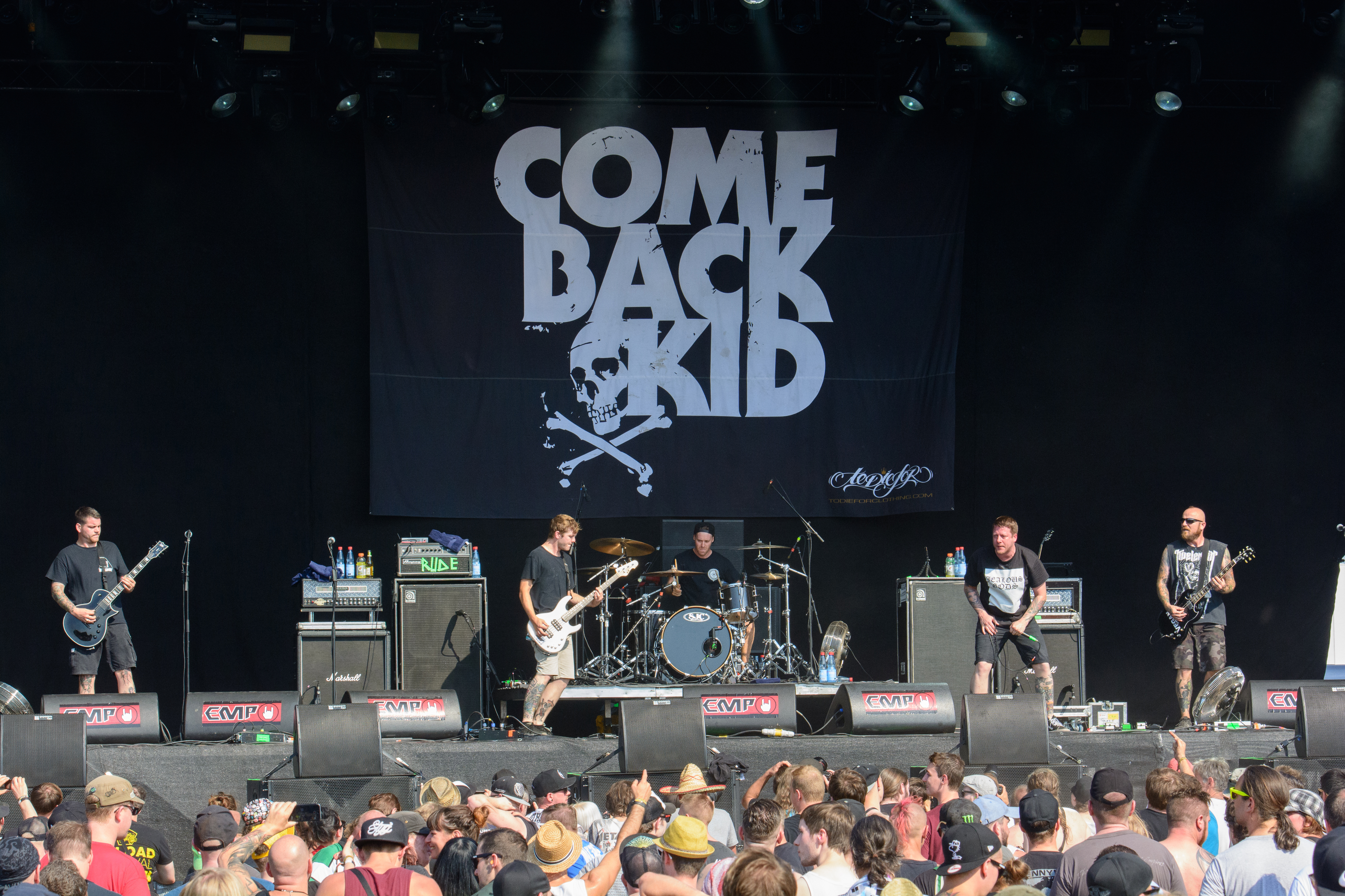 Comeback Kid beim Reload Festival 2016 in Sulingen